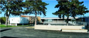 Photo de l'entrée du Stade